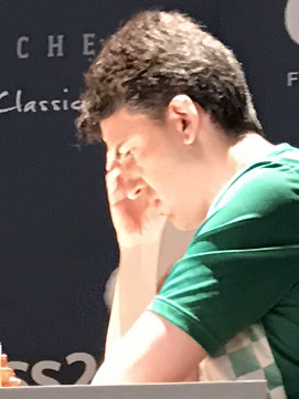 Josep Manuel López Martínez, Runde 8 der Grenke Chess Open 2019 in Karlsruhe.